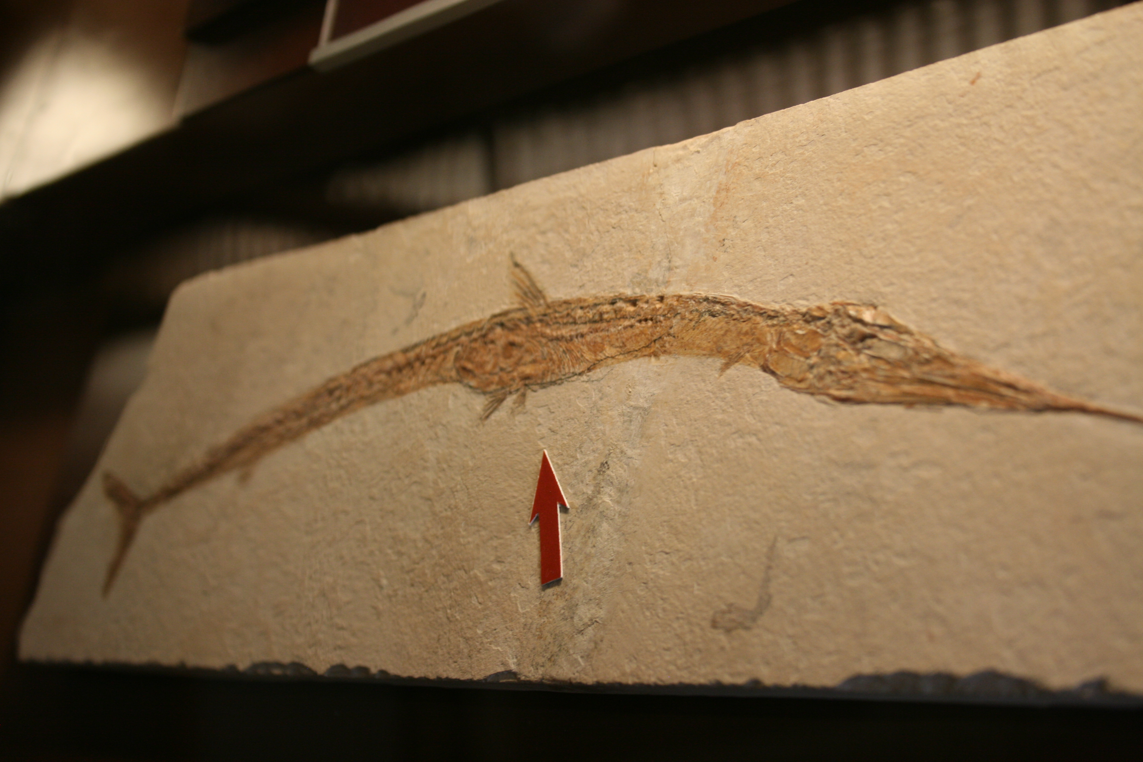 Rhynchodercetis mit Beutefisch aus dem Libanon